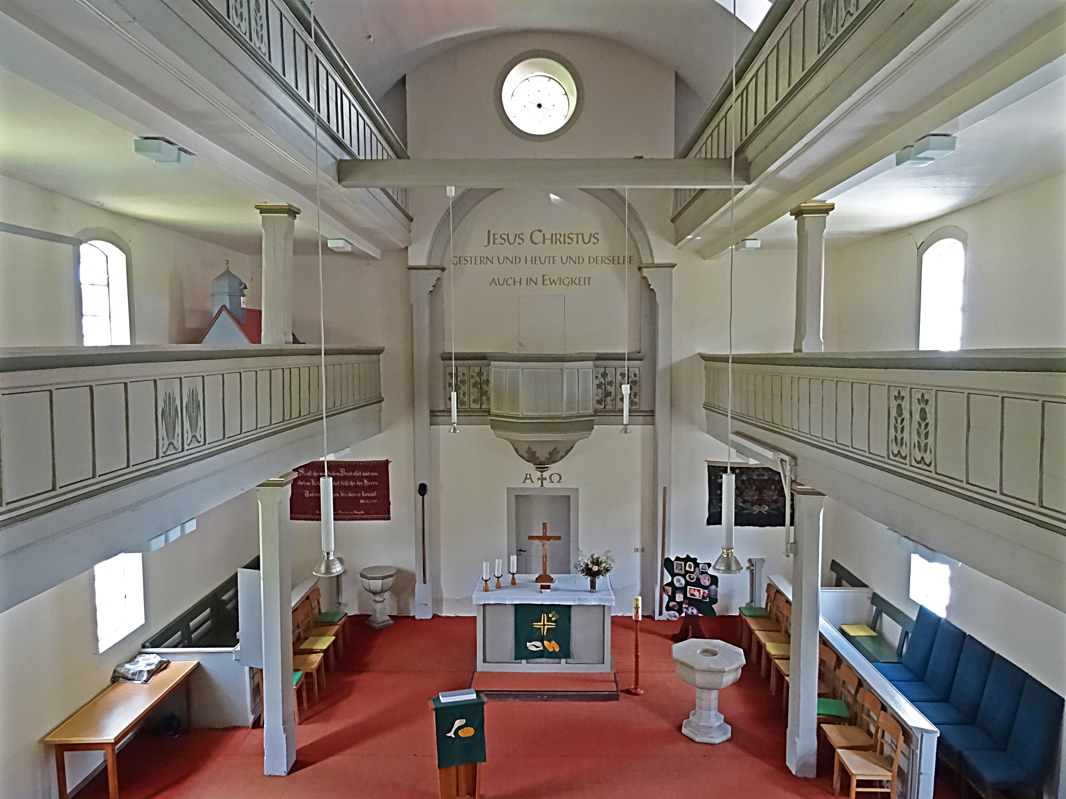 Innenraum der St.-Johannis-Kirche (Winterstein)